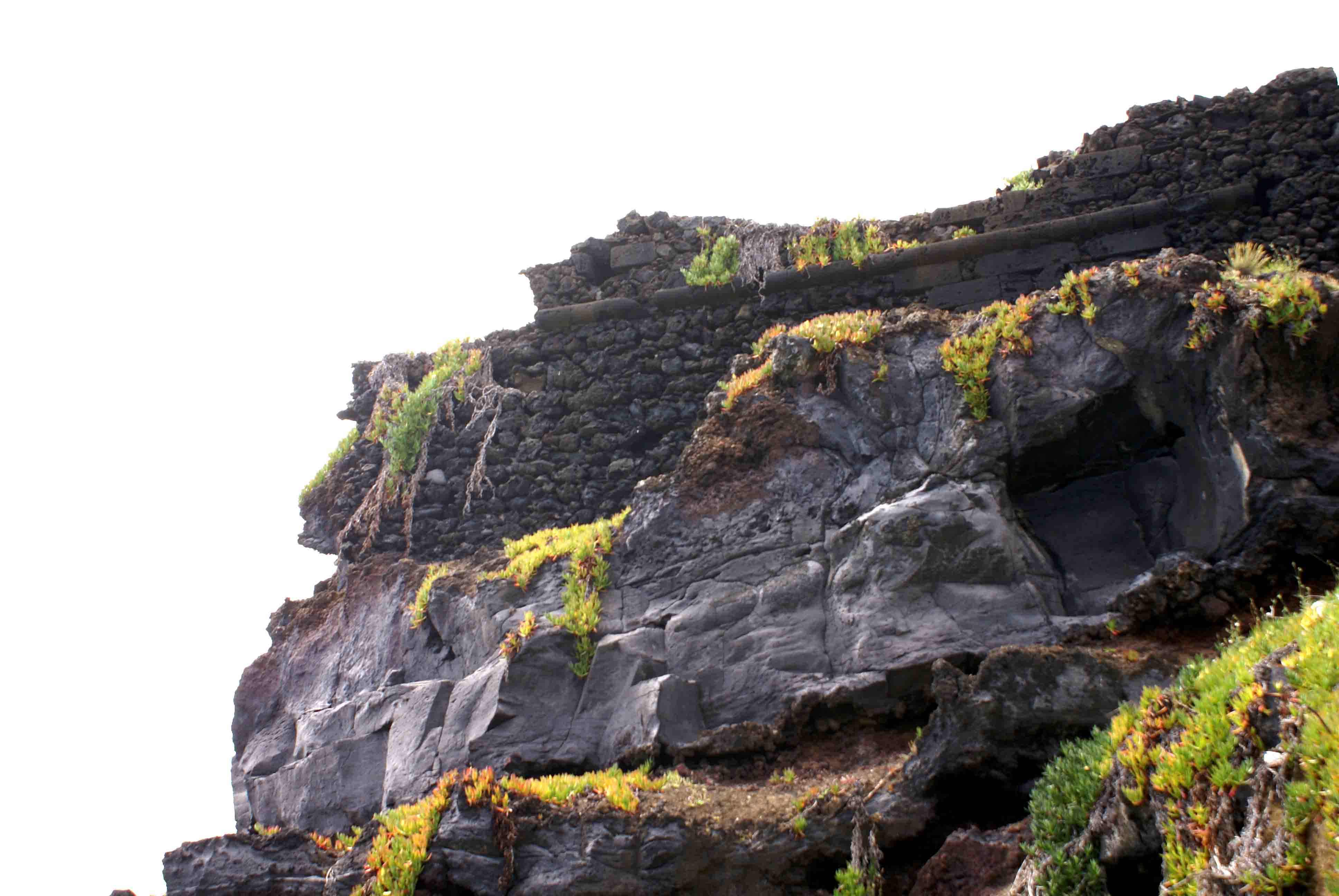 Forte do Porto das Cinco Ribeiras, Rocha base de Basalto, freguesia das Cinco Ribeiras, Angra do Heroísmo, ilha Terceira, Açores, Portugal.